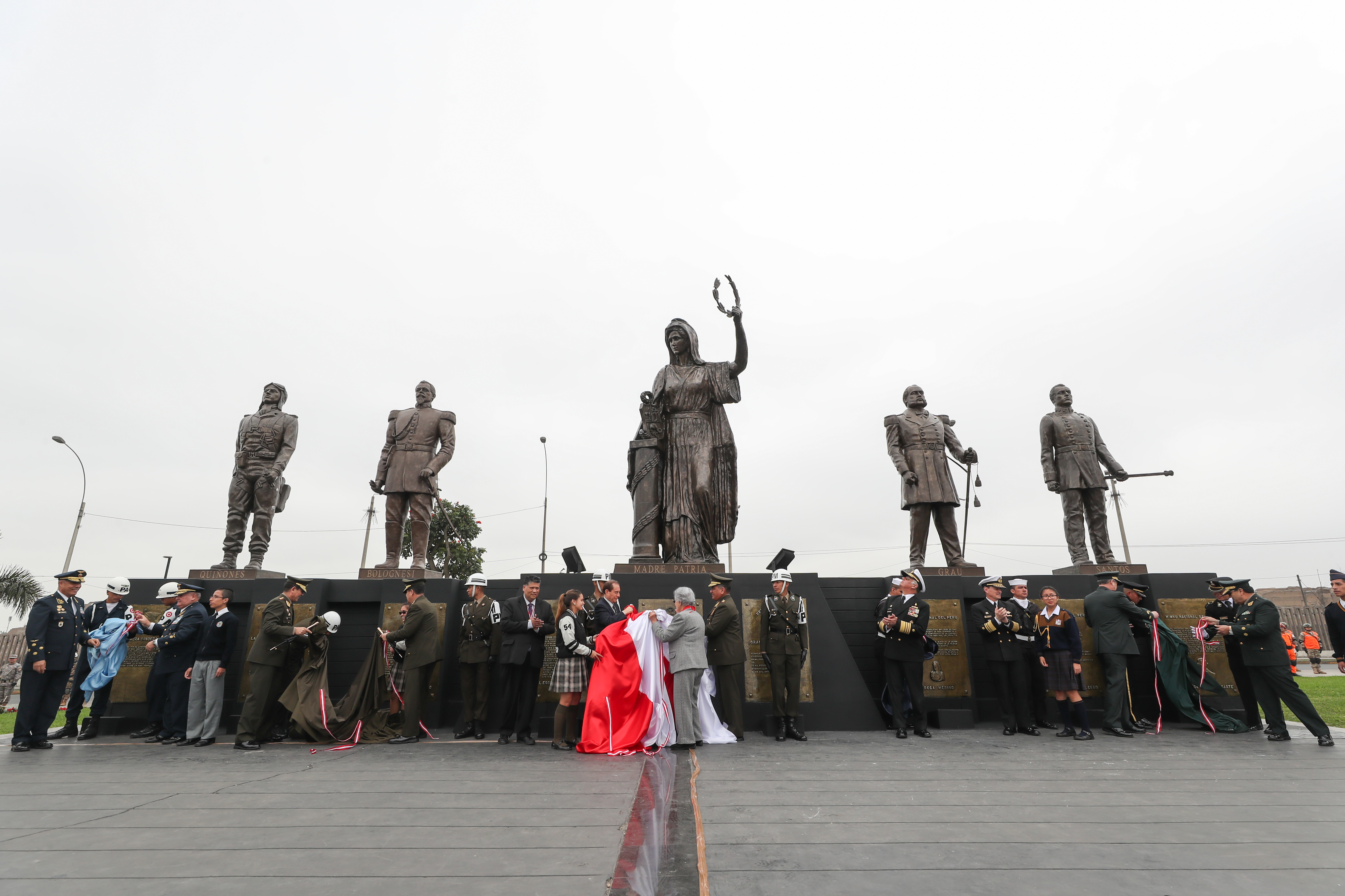 MINISTRO DE DEFENSA PRESIDIÓ CEREMONIA POR EL 199 ANIVERSARIO DE CREACIÓN DE LA PRIMERA BANDERA DEL PERÚ